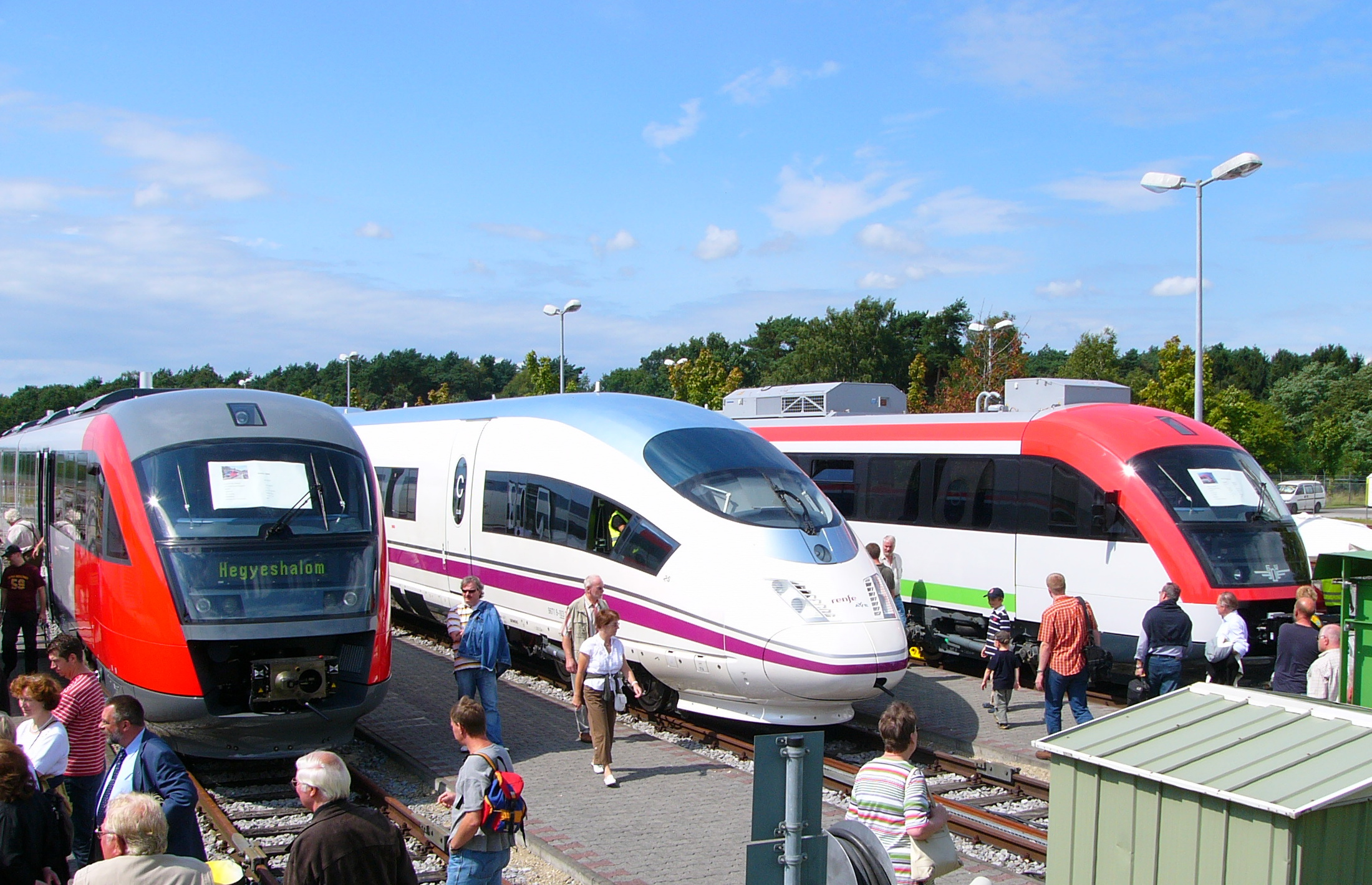 Prüf- und Validationscenter der SIEMENS AG Verkehrstechnik in Wegberg-Wildenrath bei einem Tag der Offenen Tür